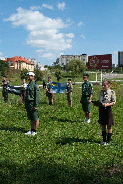 Пластовий фестиваль активного вiдпочинку Про100 лiто